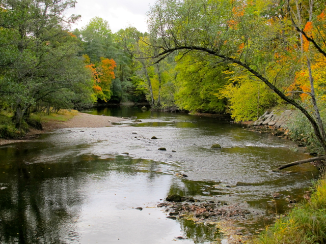 Naturreservatet Jonsereds strömmar längs med Säveån i Jonsered. Foto taget strax söder om Jonsereds station.